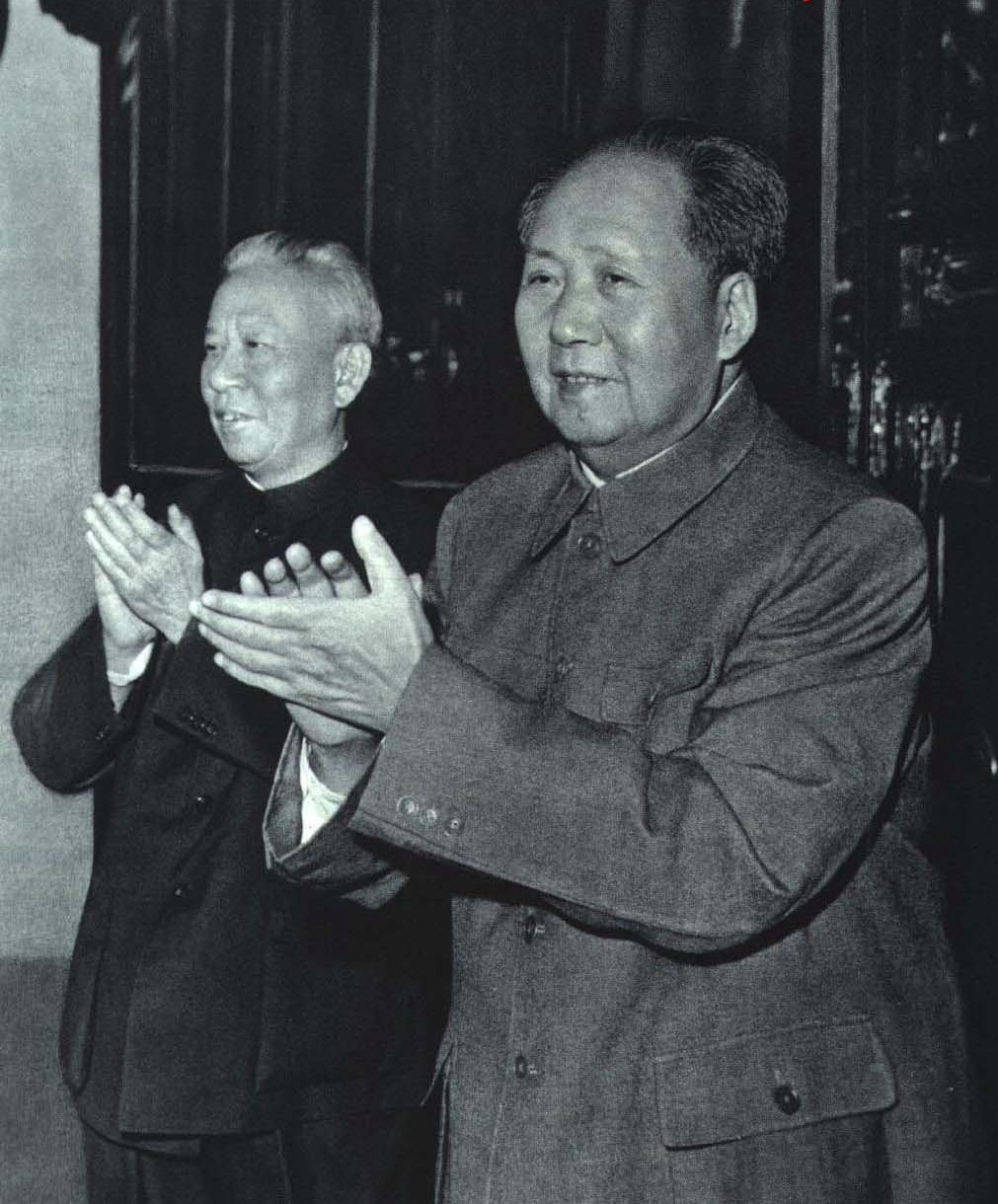 1964-11 1964年 中华人民共和国国庆15周年 刘少奇毛泽东